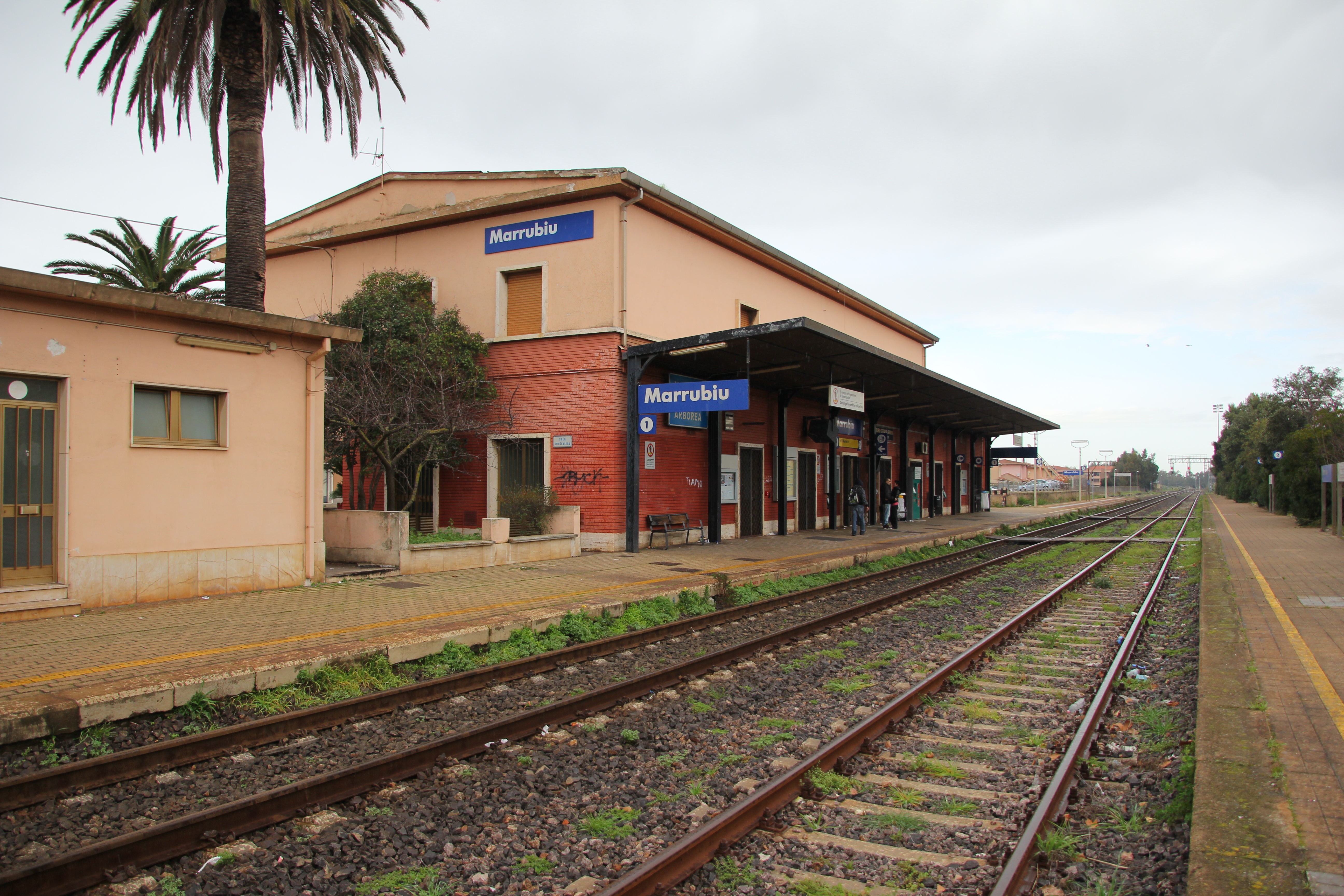 Marrubiu - Stazione ferroviaria